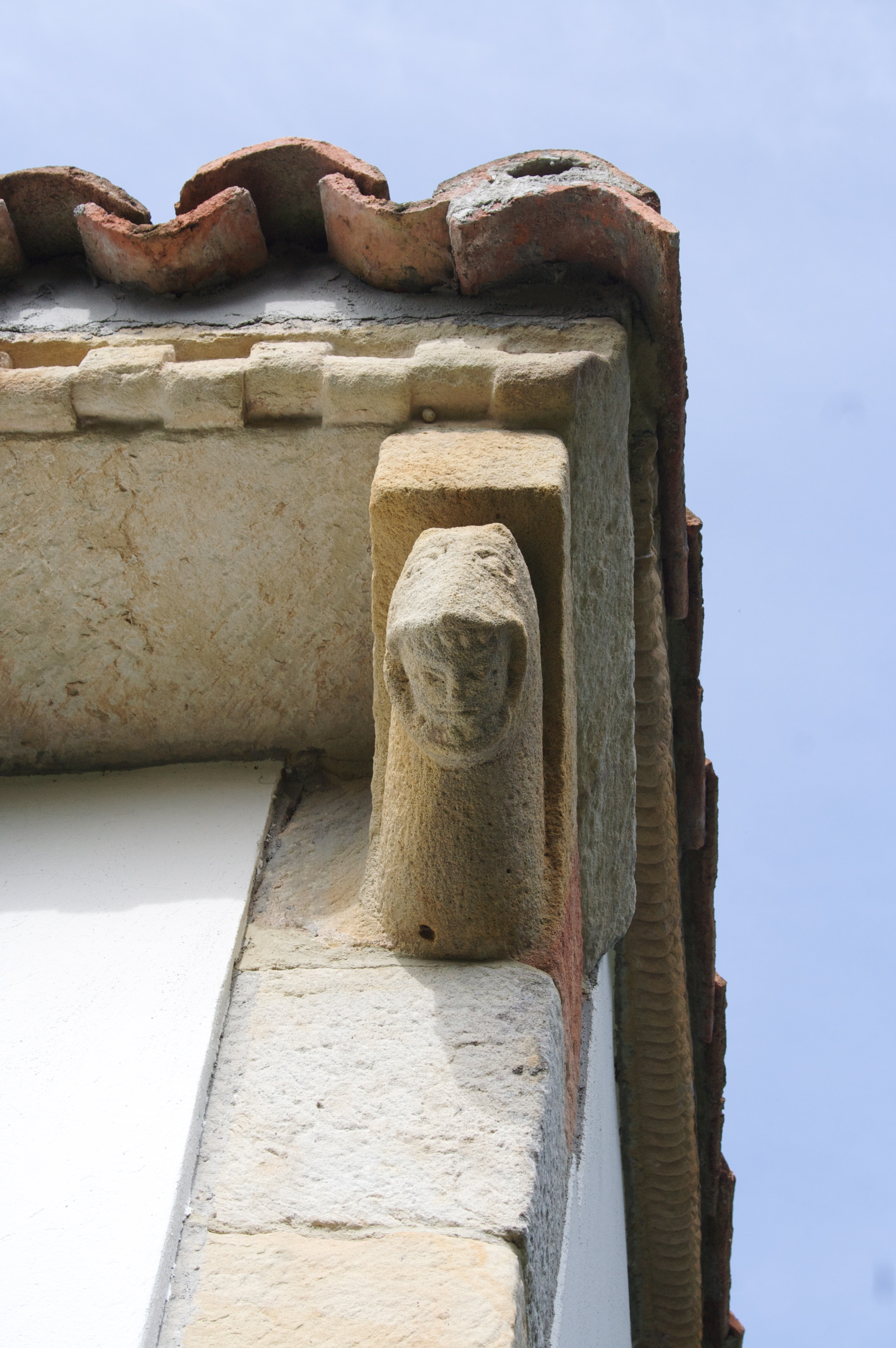 Iglesia de San Salvador, Fuentes, Villaviciosa. Detalle